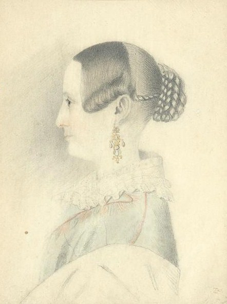 Пелагея Васильевна Муравьева, рождённая Шереметева (1802-1871)